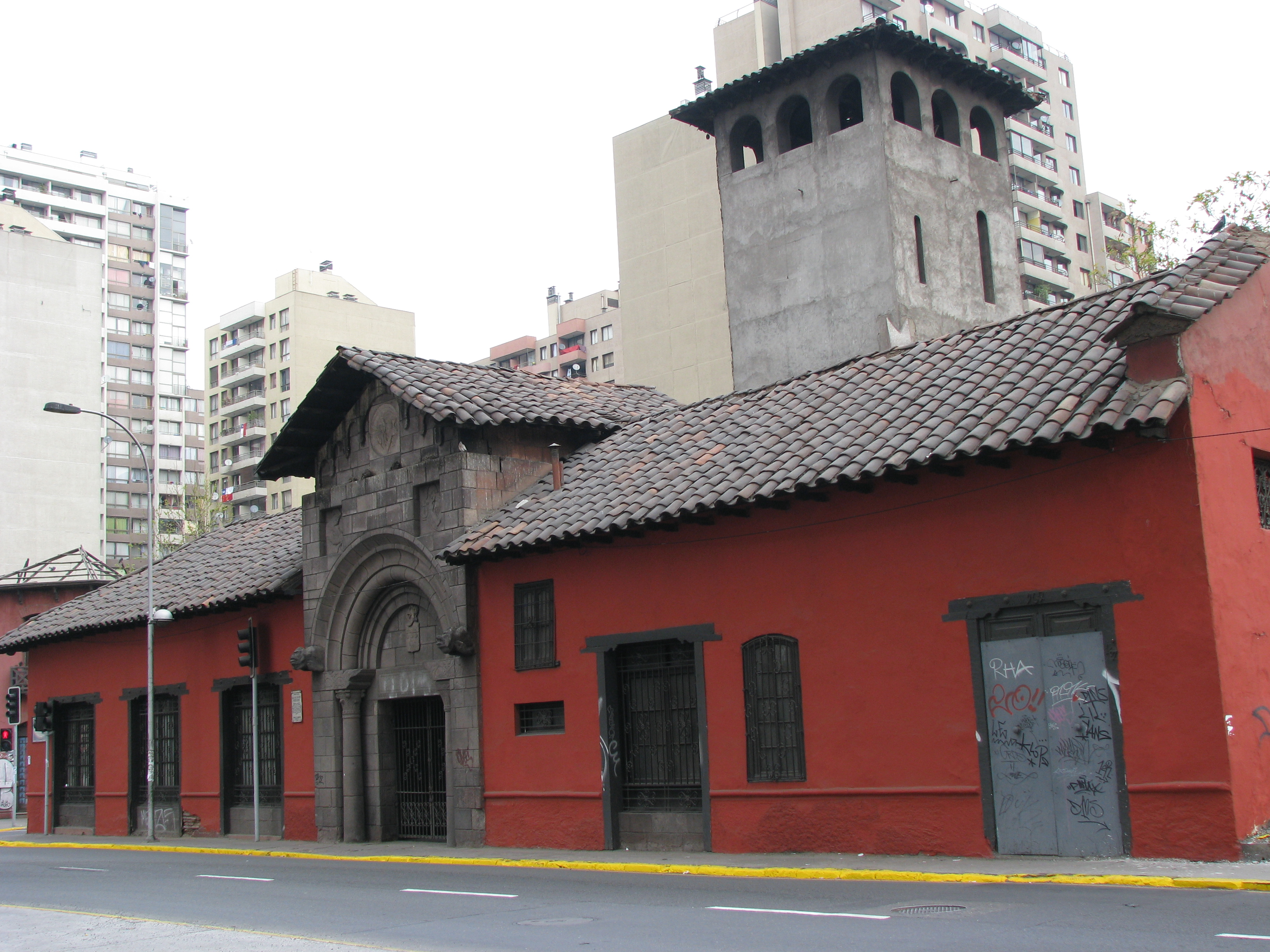 Casa de Los Diez This is a photo of a national monument in Chile: 902